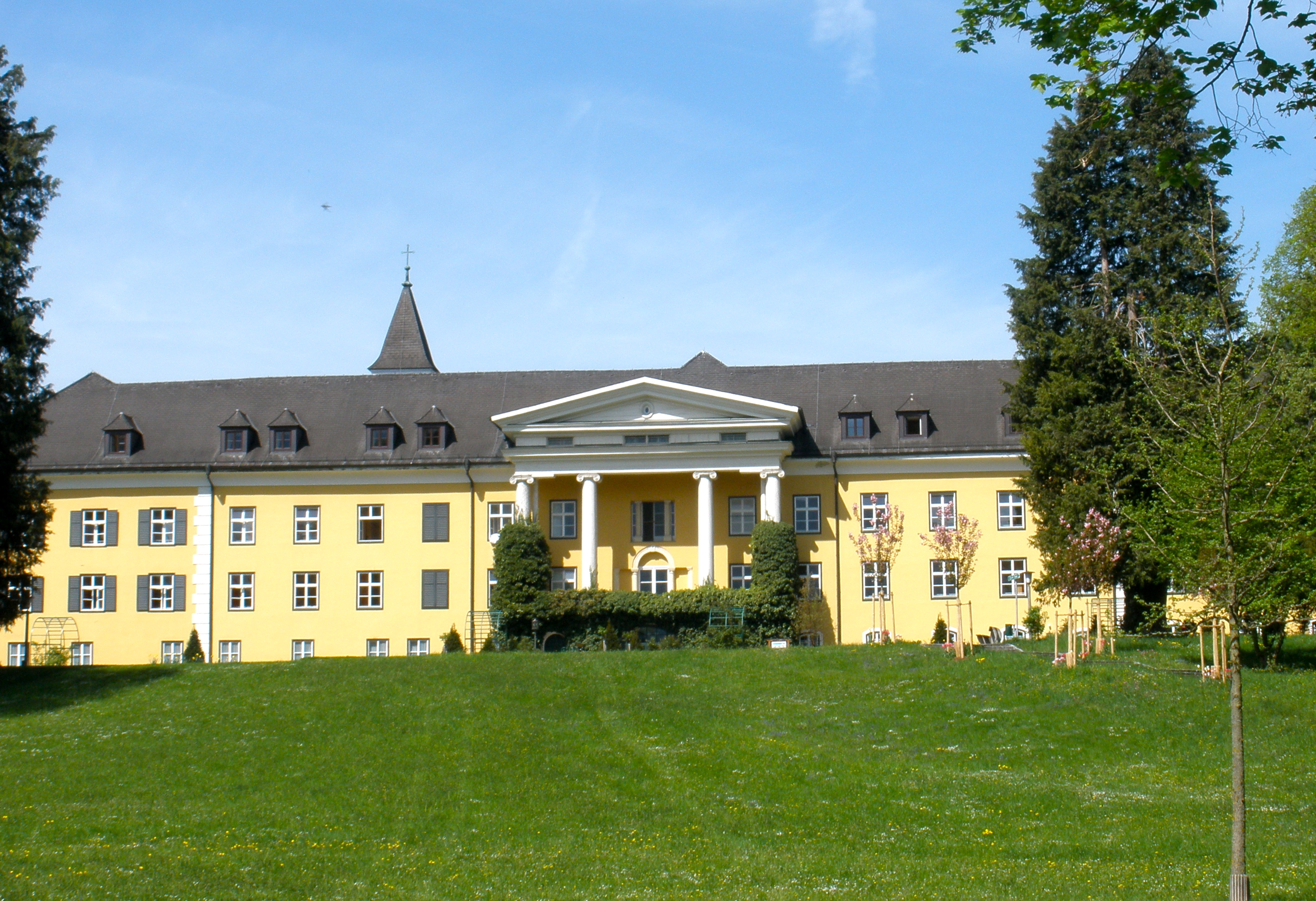 Urkundlich wurde das Schloss Ebenzweier in Altmünster bereits im 13. Jahrhundert als Herrschaftssitz erwähnt. Das heutige Aussehen erhielt das Schloss 1842, als es Erzherzog Maximilian d'Este, ein Enkel der Kaiserin Maria Theresia, umbauen ließ. Heute ist im Schloss Ebenzweier eine gastgewerbliche Berufsschule untergebracht.